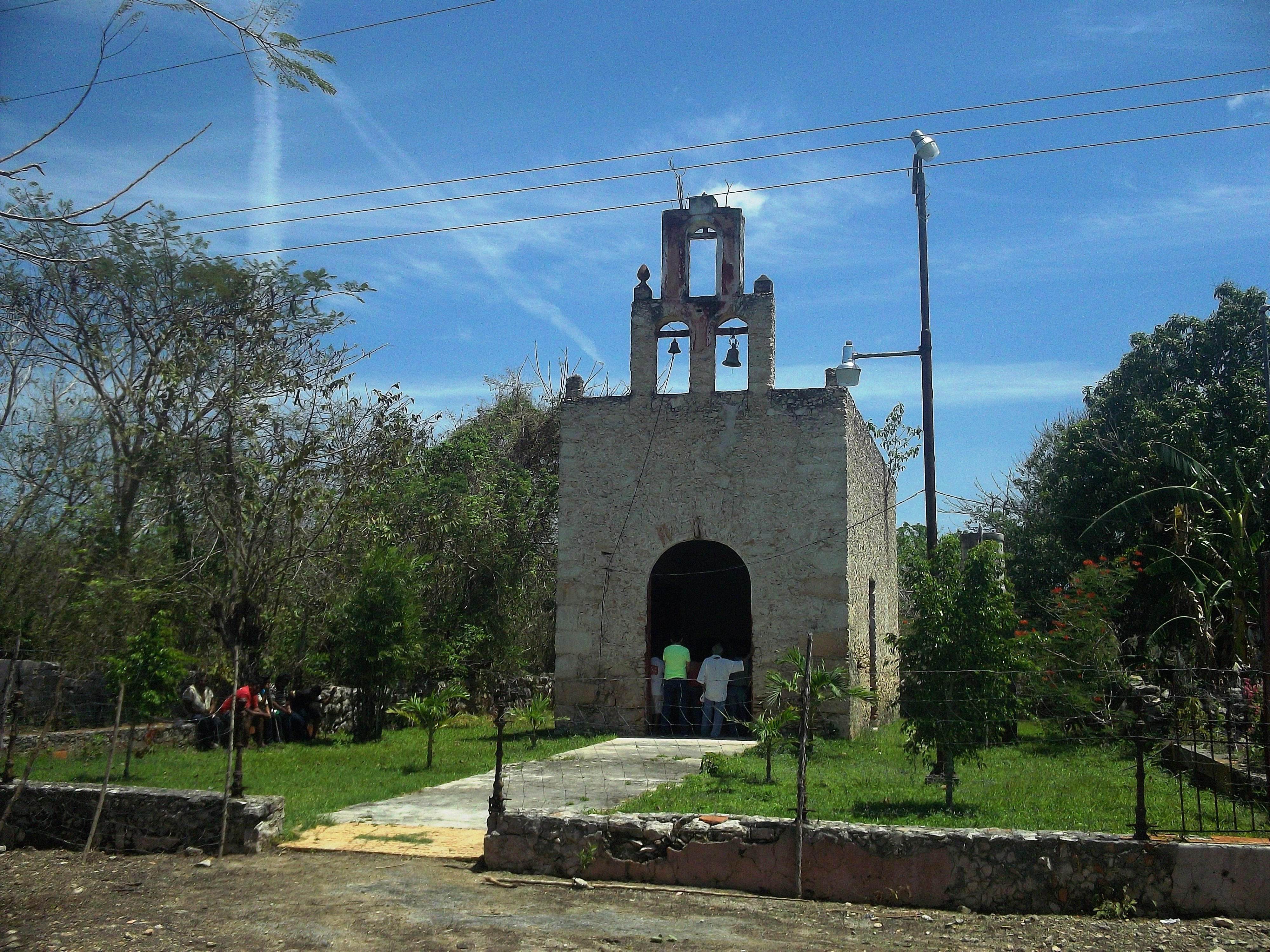 Iglesia principal Chucmichén, Yucatán.